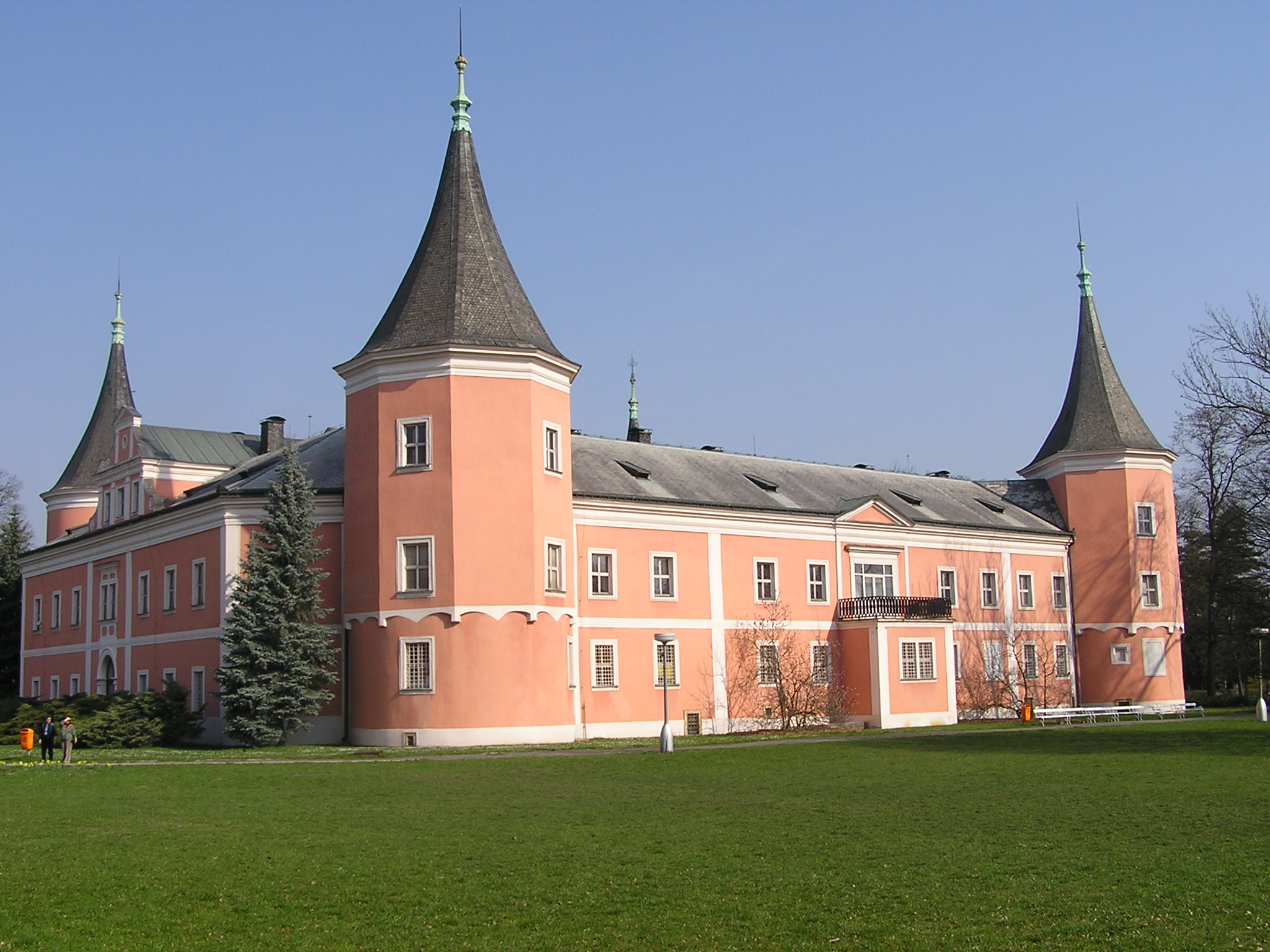 Sídlo Městské knihovny Sokolov